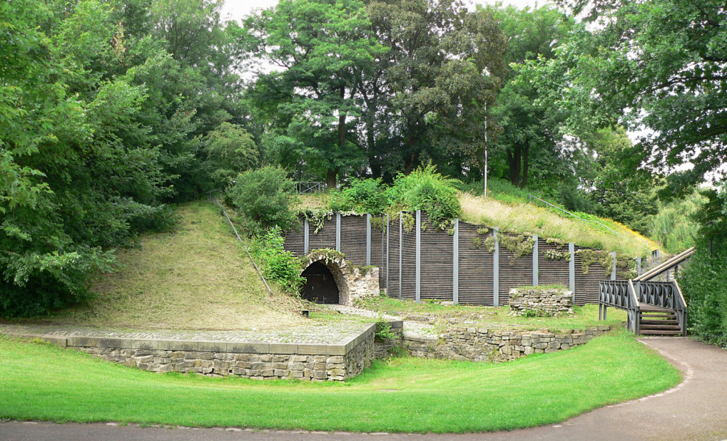 Erichsschanze in Neustadt am Rübenberge